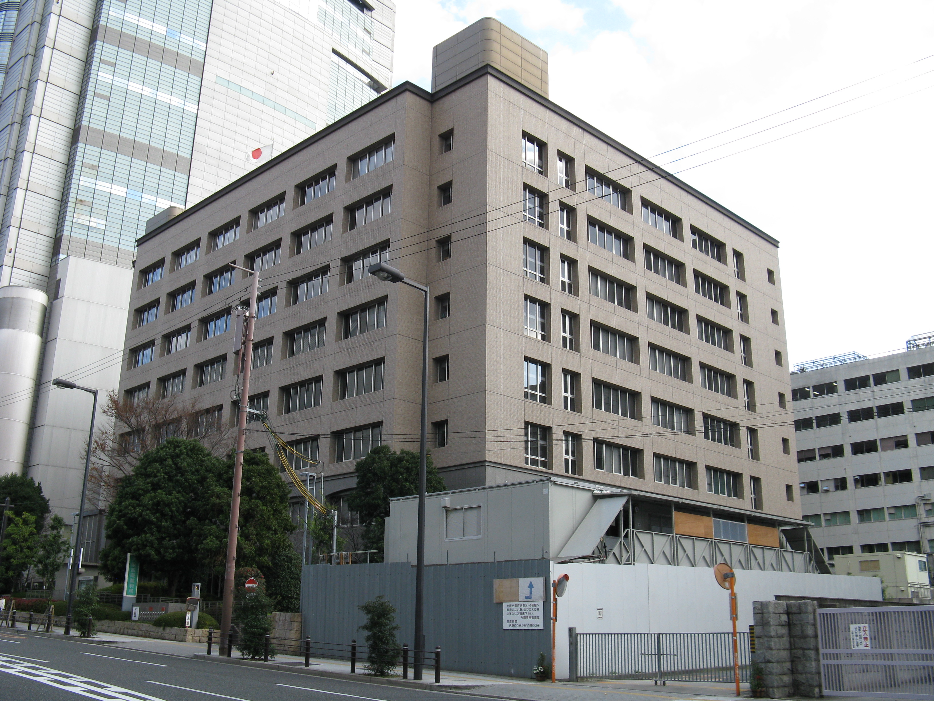 大阪家庭裁判所